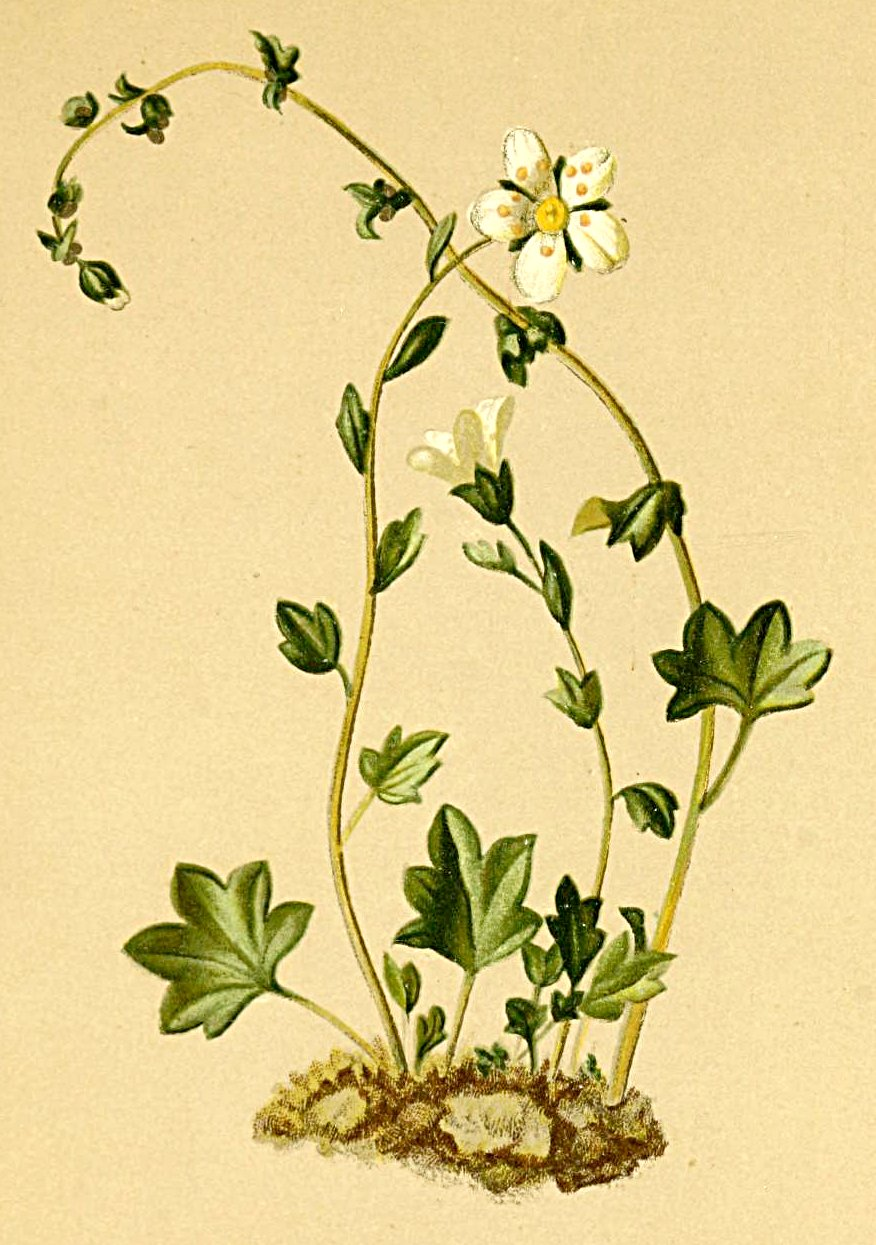 Saxifraga cernua